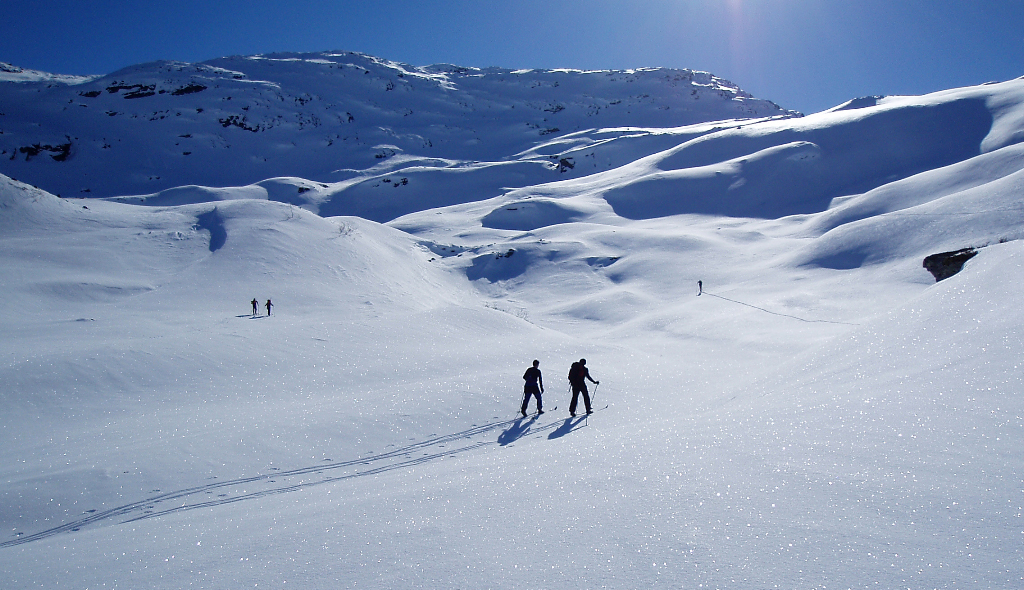 From a skiing trip to Skorafjell (1583 m a.s.l.) in western Norway.Trip to Skorafjell #1